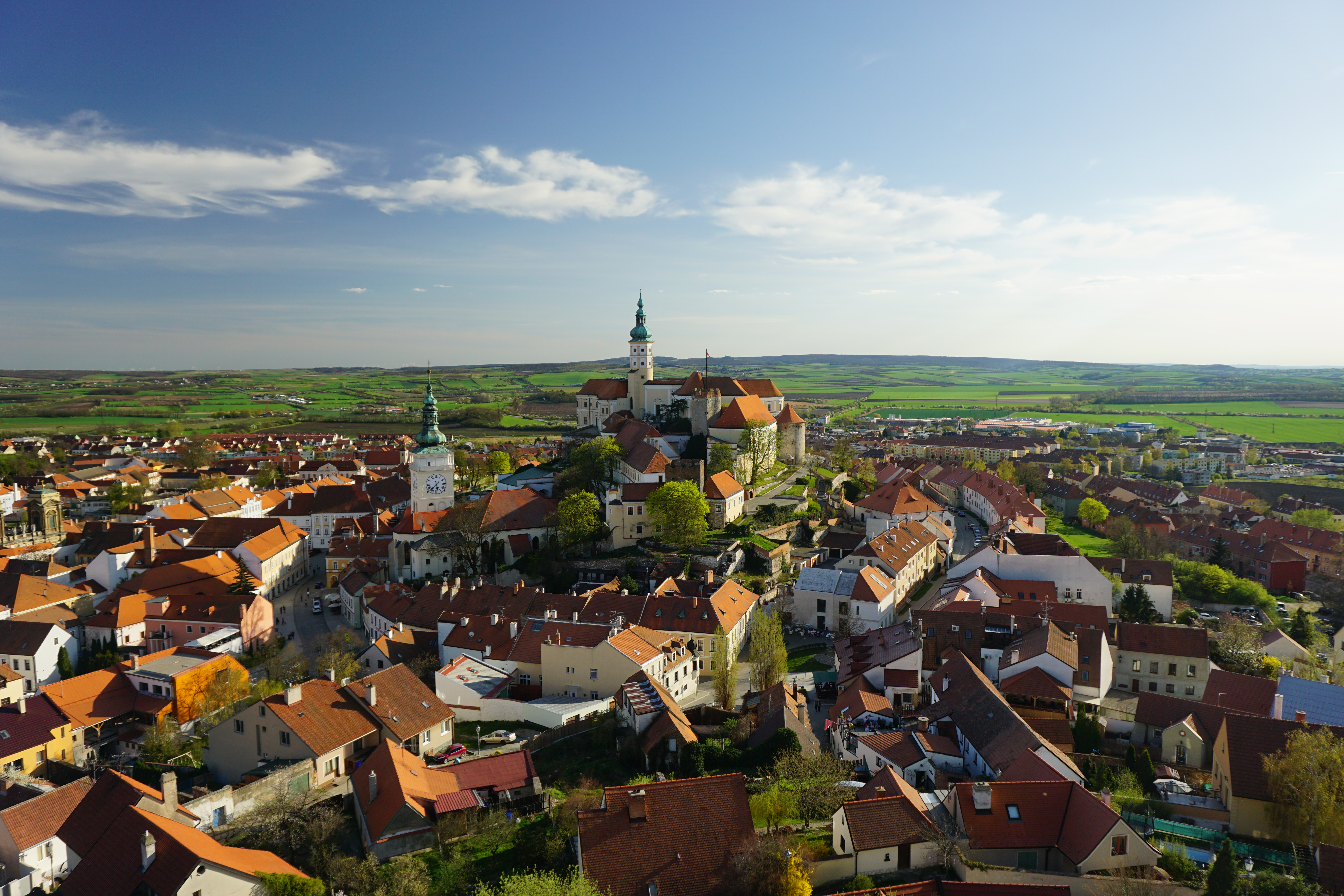 Nikolsburg, Blick auf das Schloss